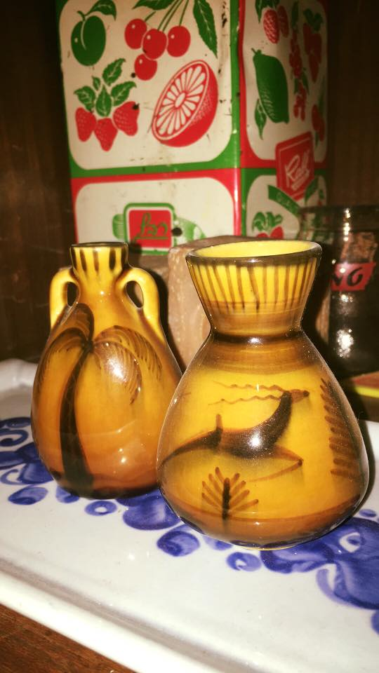 כלי קרמיקה של חברת לפיד מאוסף ארבל לוי